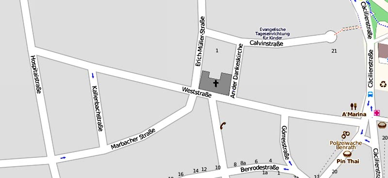 Karte Weststrasse Benrath, Düsseldorf